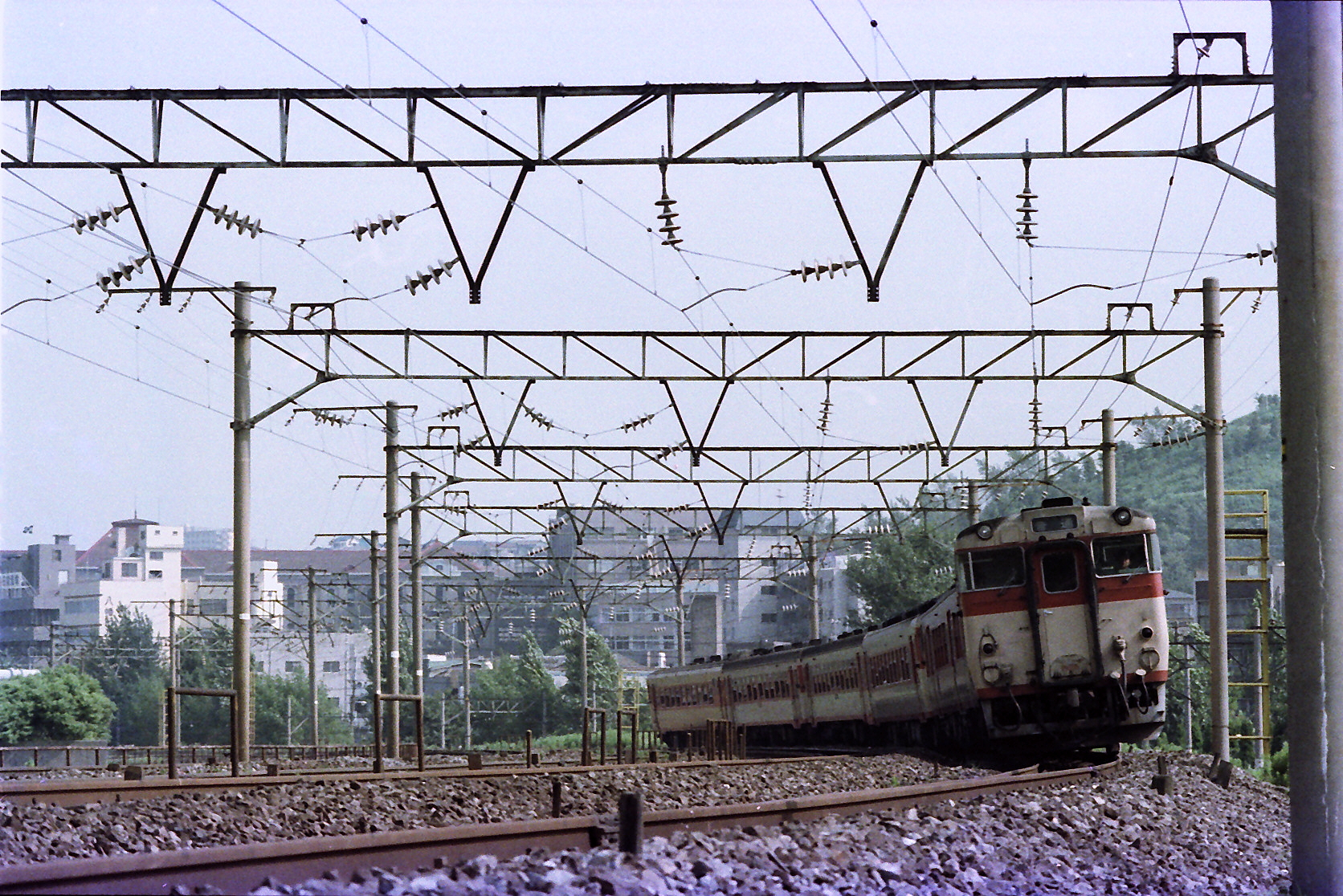 小倉発 飯塚行き列車 鹿児島本線 枝光駅-八幡駅（旧線） 枝光カーブ